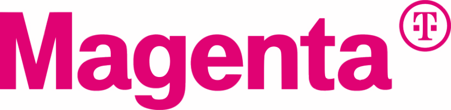 Logo von